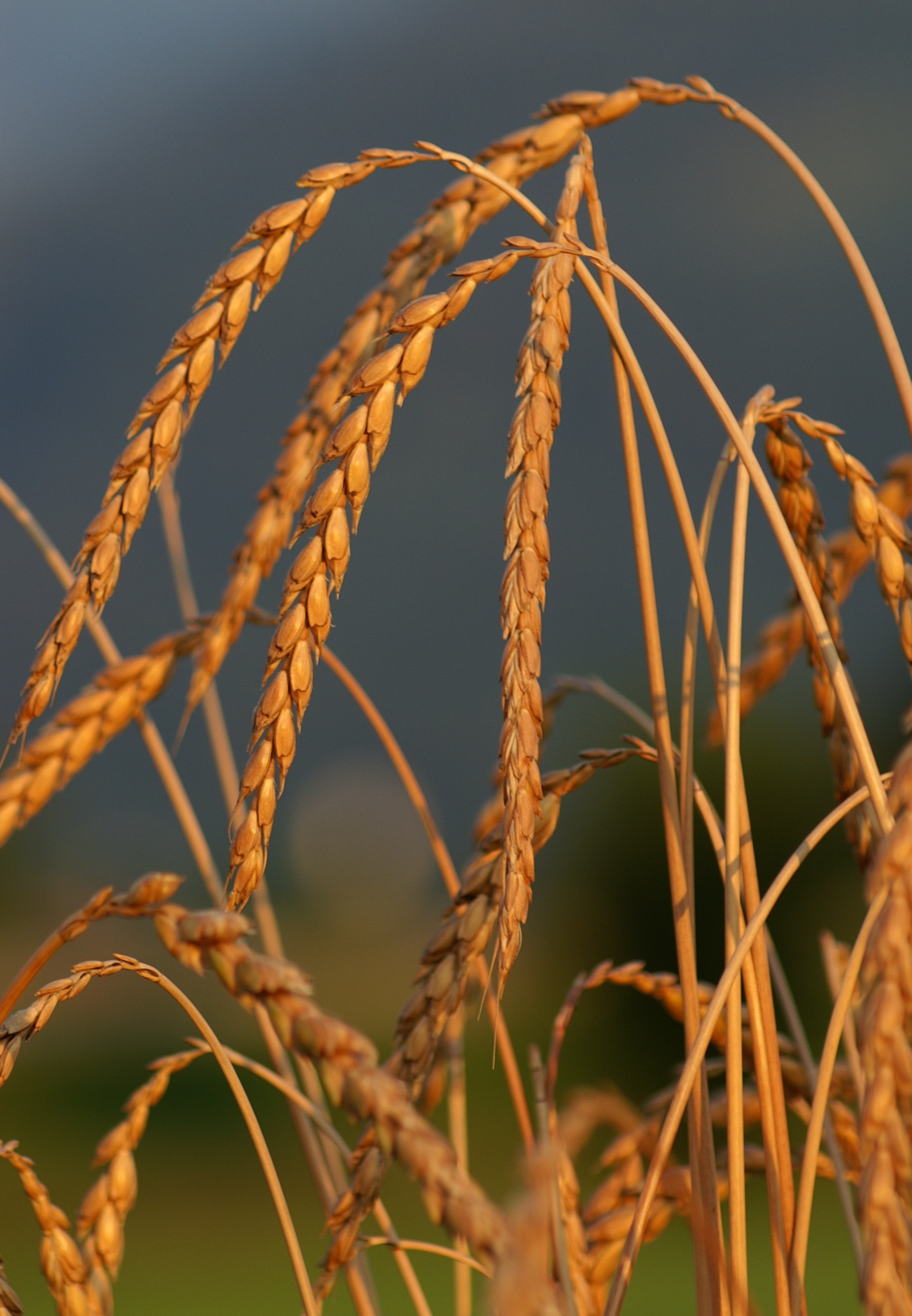 Dinkel (Triticum spelta oder Triticum aestivum ssp. spelta) oder „Spelz“ (auch: Spelt, Fesen, Vesen oder „Schwabenkorn“) ist eine Getreideart und ein enger Verwandter des heutigen Weizens.